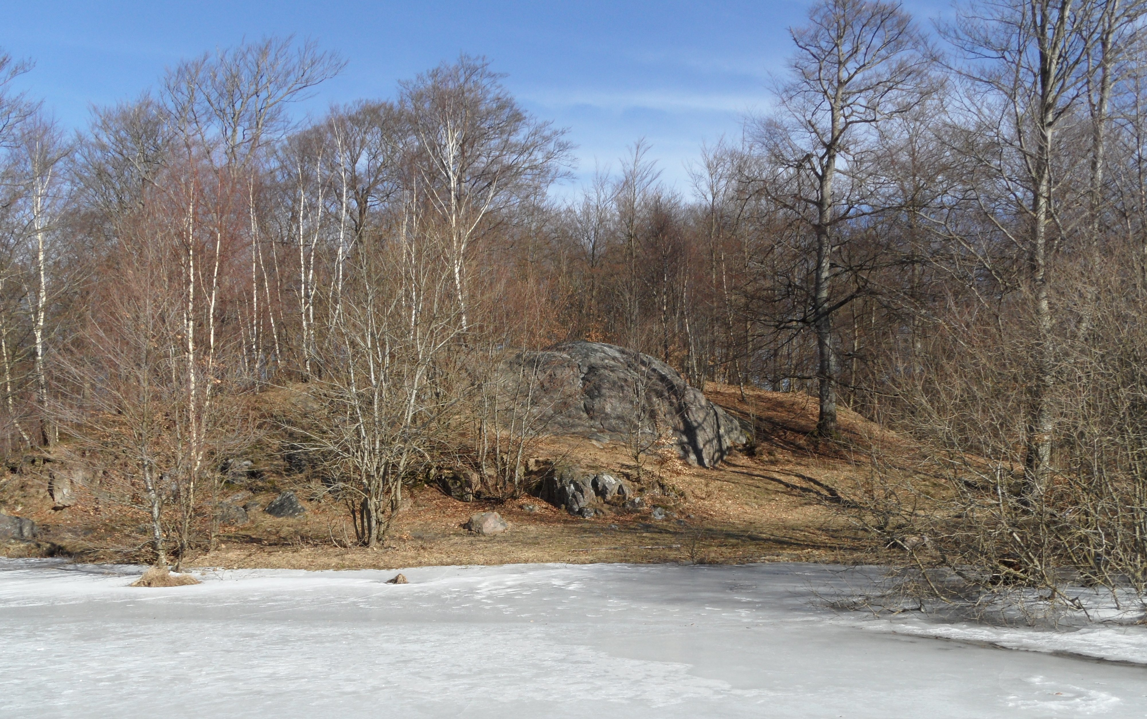 Naturreservatet Dagstorp sett från Dagstorpssjön en vårvinterdag